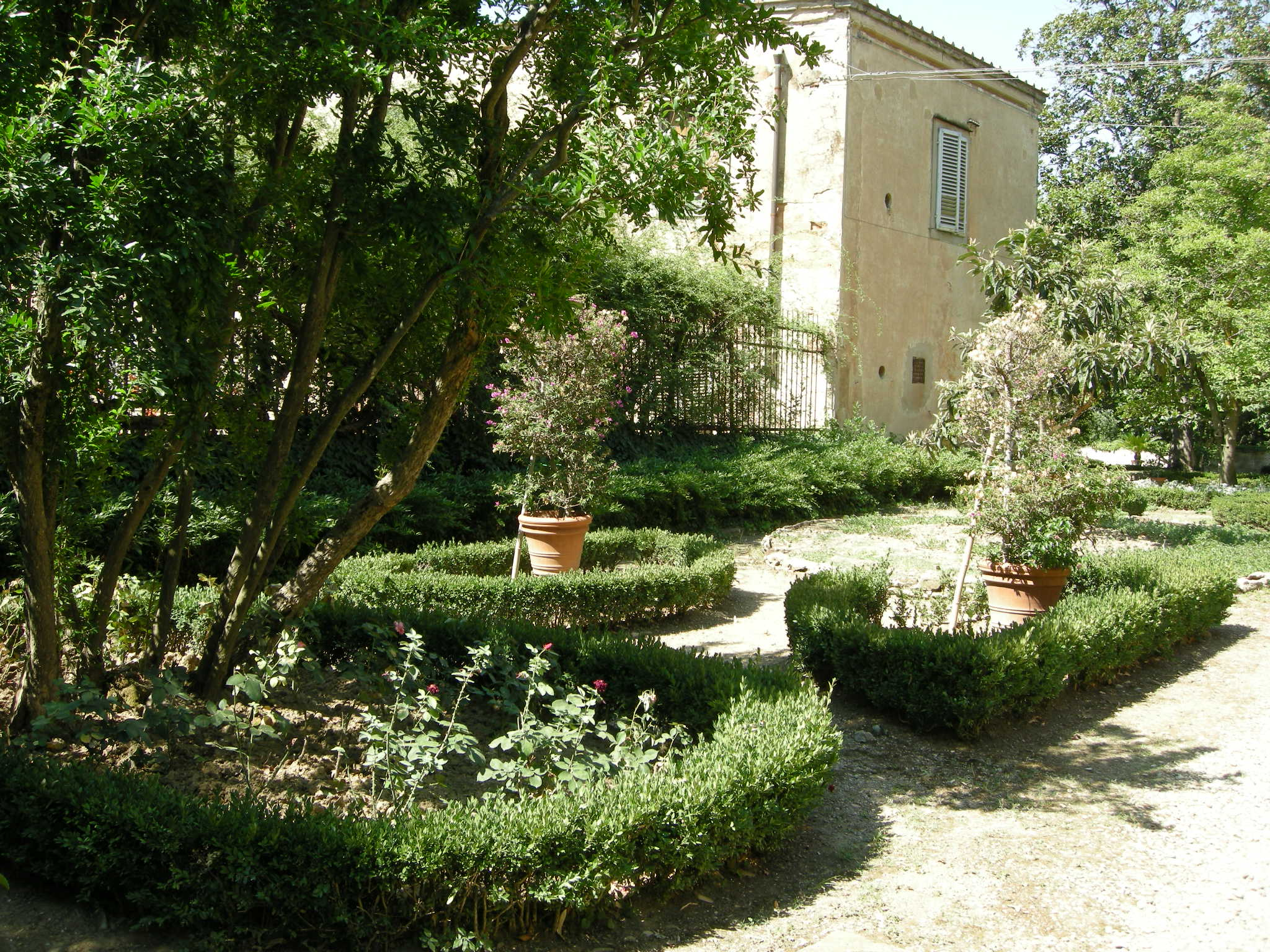 Villa di careggi, giardino